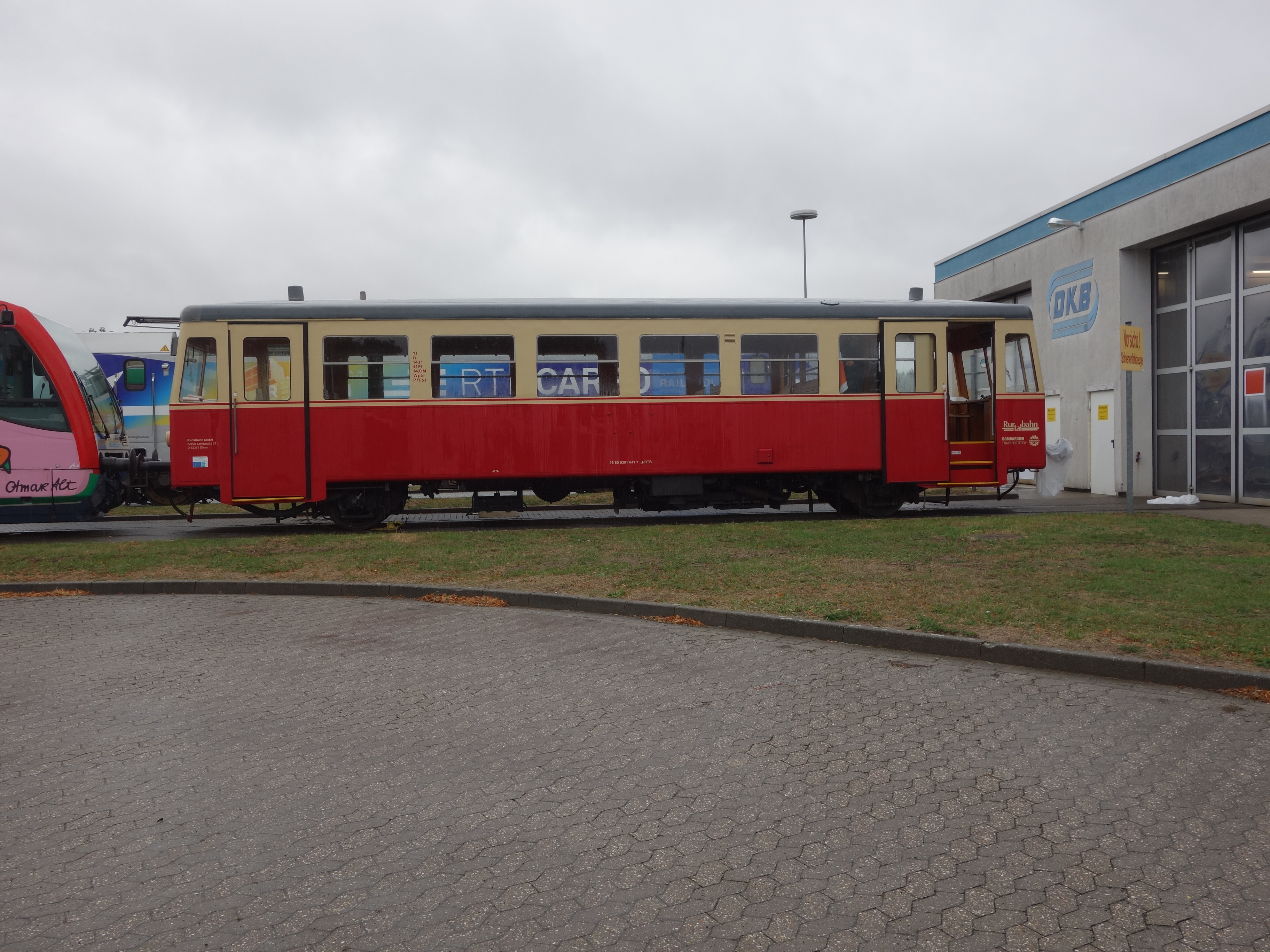 Bei der Feier "25 Jahre Rurtalbahn" im September 2018 wurden einige Fahrzeuge öffentlich ausgestellt, darunter auch der T 1, welcher 1952 für die Jülicher Kreisbahn (JKB) geliefert worden war. Als diese am 1. Januar 1984 von der Dürener Kreisbahn übernommen wurde, gelangte er dorthin und erhielt eine Lackierung in den DKB-Hausfarben blau/beige mit großem Schriftzug "Heggeströffer". 2009 wurde er generalsaniert und erhielt sein ursprüngliches Farbkleid zurück. Gut erkennbar durch die Fenster sind die noch als Holz gefertigten Sitzbänke. Da er für eine nur 15 km lange Strecke beschafft wurde, war dies in den 1950er-Jahren eine akzeptable Sparmaßnahme, während bei der Bundesbahn bereits Polstersitze verbaut wurden.